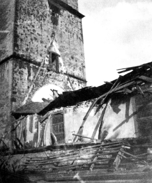 Evangelische Kirche Leihgestern, Landkreis Gießen, Hessen, Deutschland